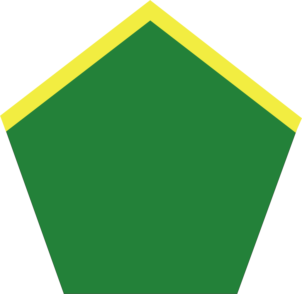 Patka artylerii przeciwlotniczej (na kołnierz) wprowadzona w Wojsku Polskim w Anglii w 1941